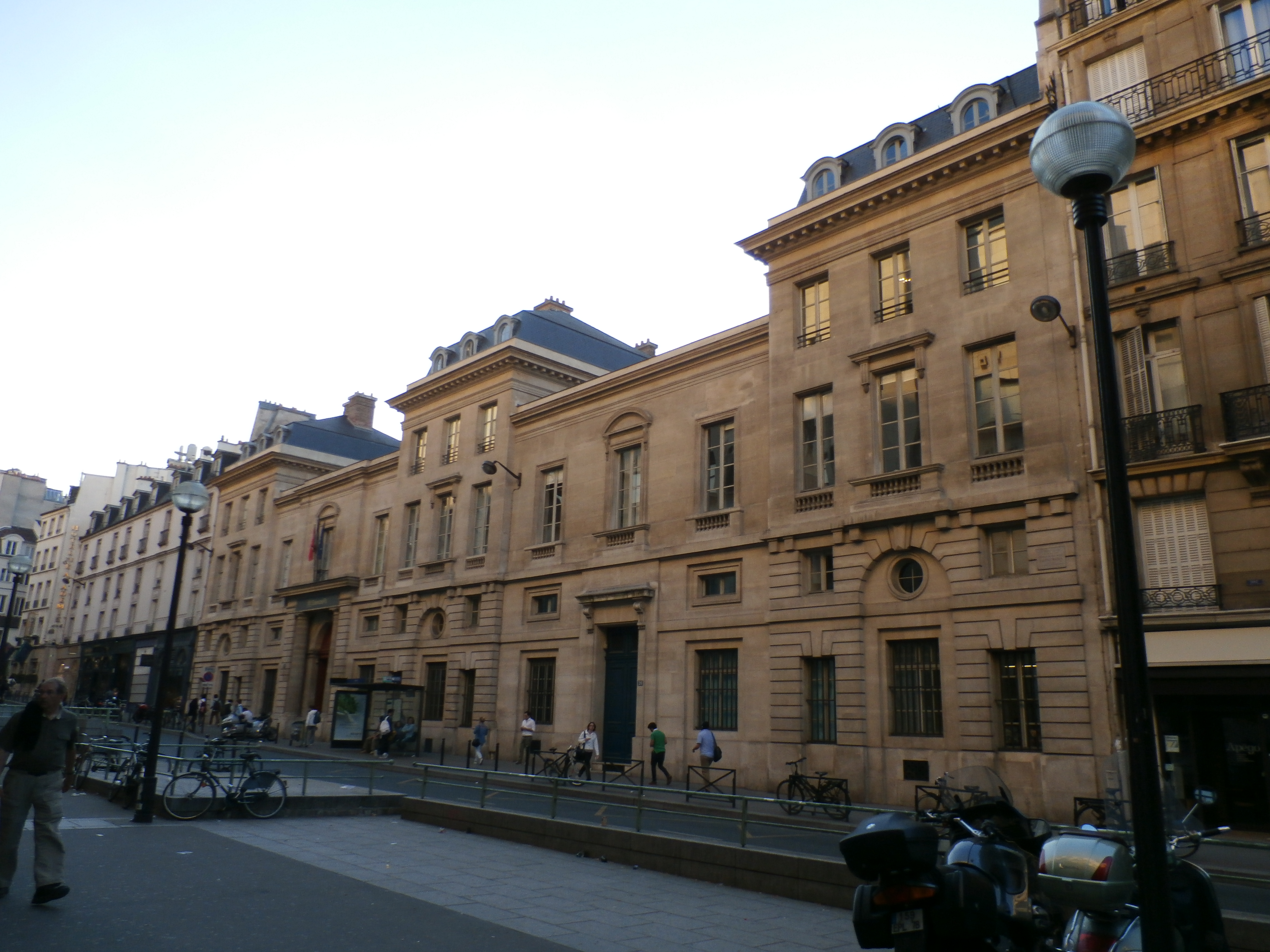 École nationale des Ponts et Chaussées(ancien hôtel de Fleury) (Inscrit) .